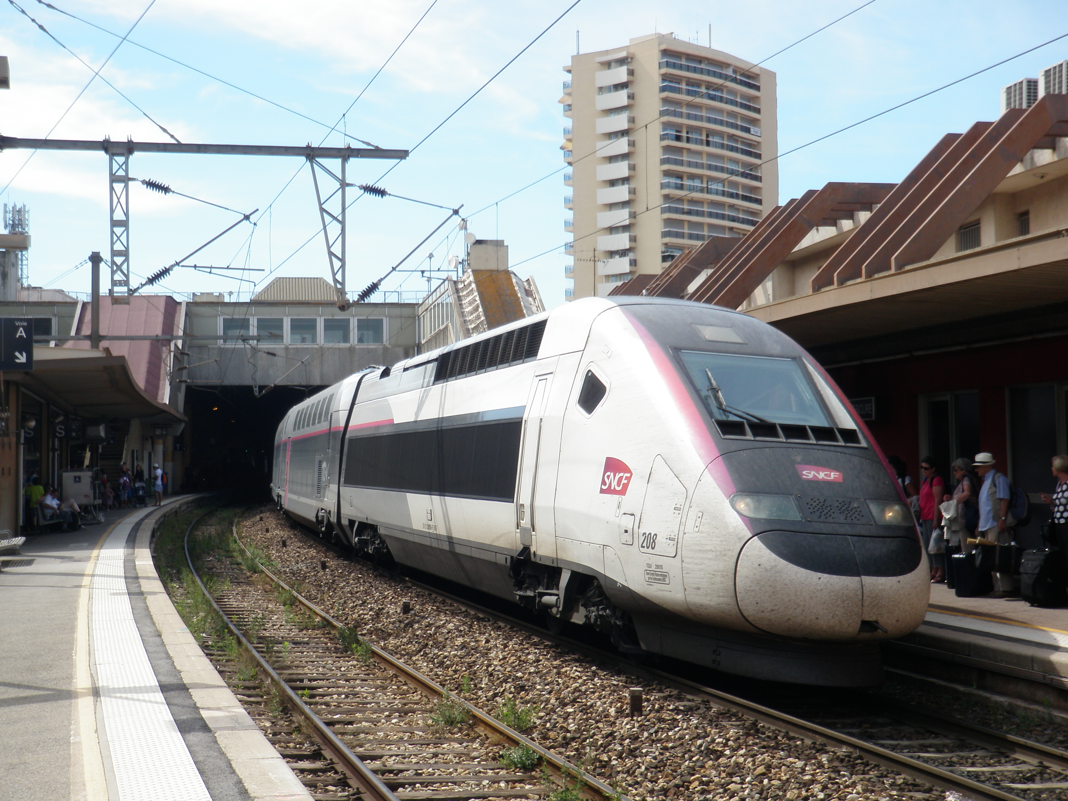 TGV Duplex 208 carmillon im Bahnhof Saint-Raphaël-Valescure